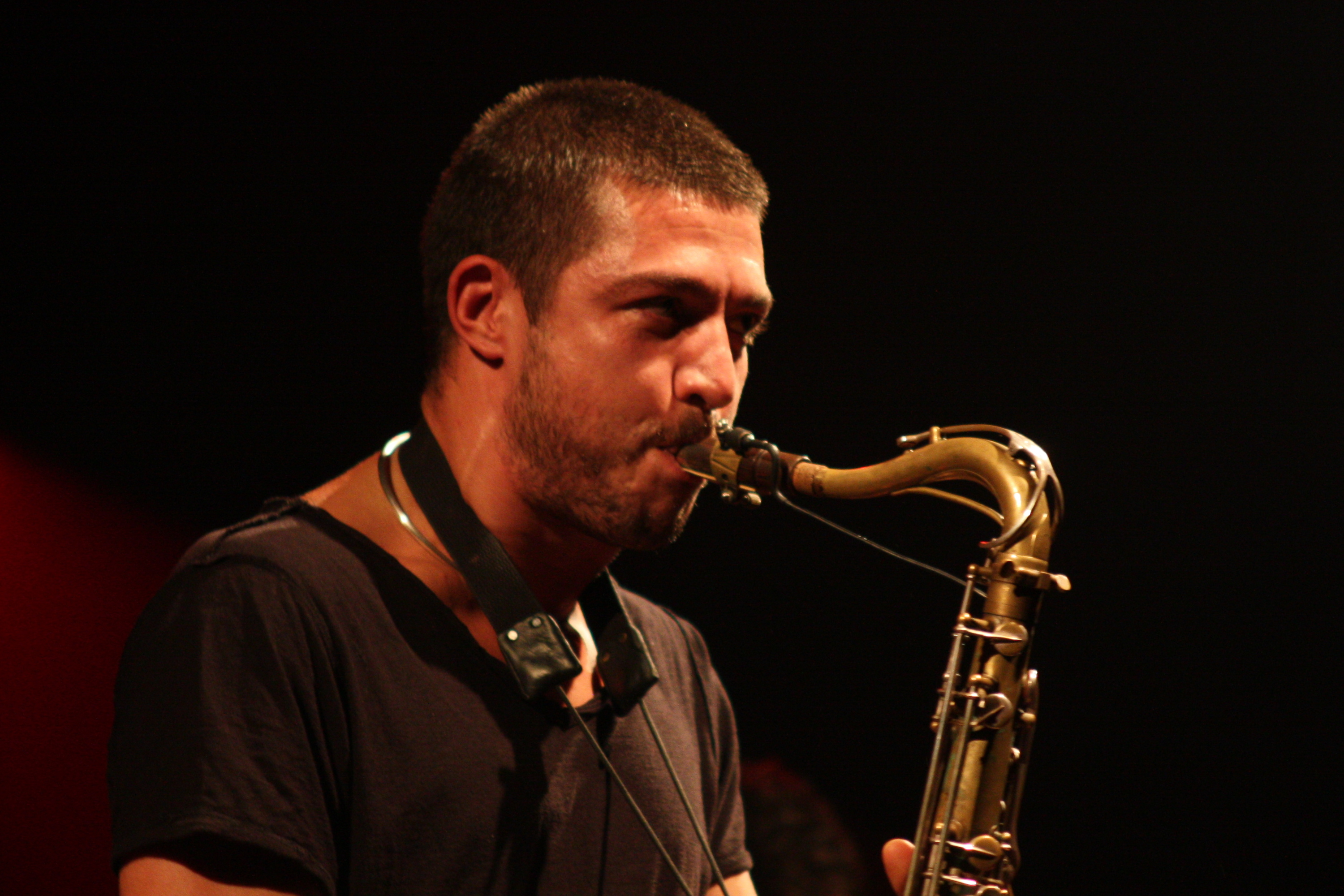 44. Deutsches Jazzfestival Frankfurt 2013: Guillaume Perret